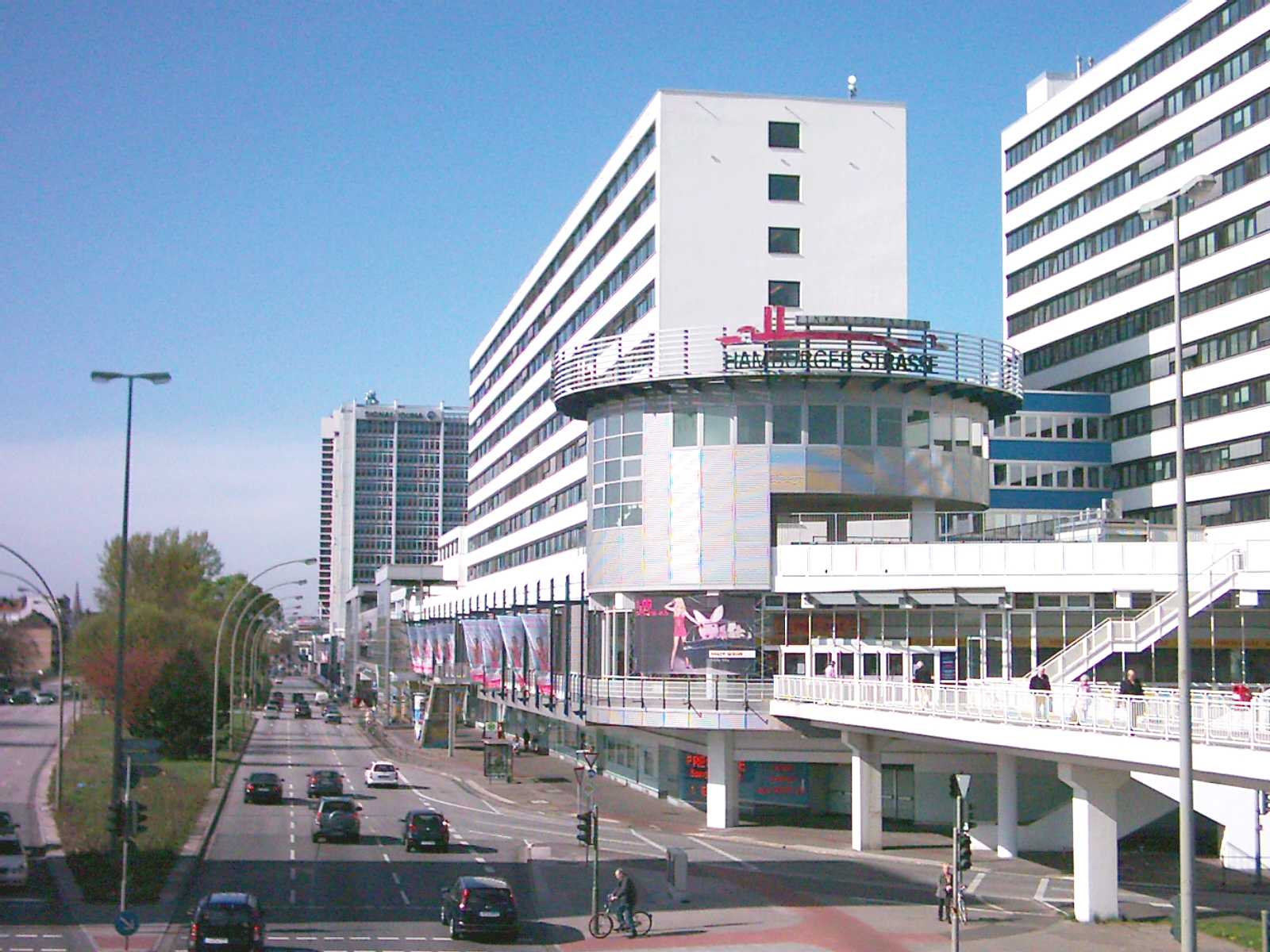 Das Einkaufszentrum Hamburger Straße in Hamburg-Barmbek-Süd.